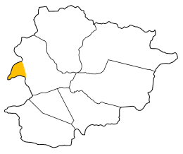 Localització de la vall de Setúria, a Andorra. Imatge pròpia.